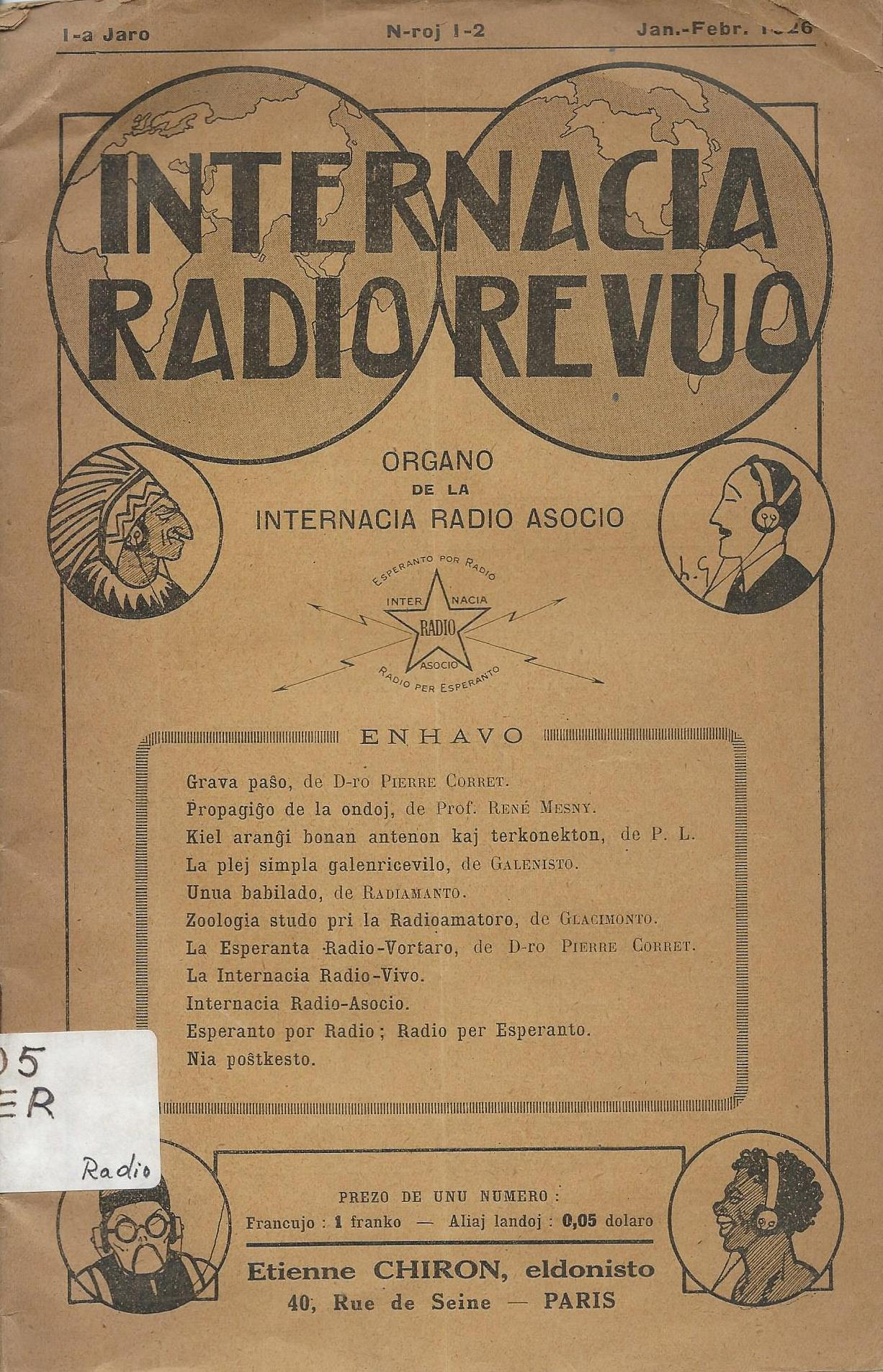 Kovrilo de "Internacia Radio Revuo"